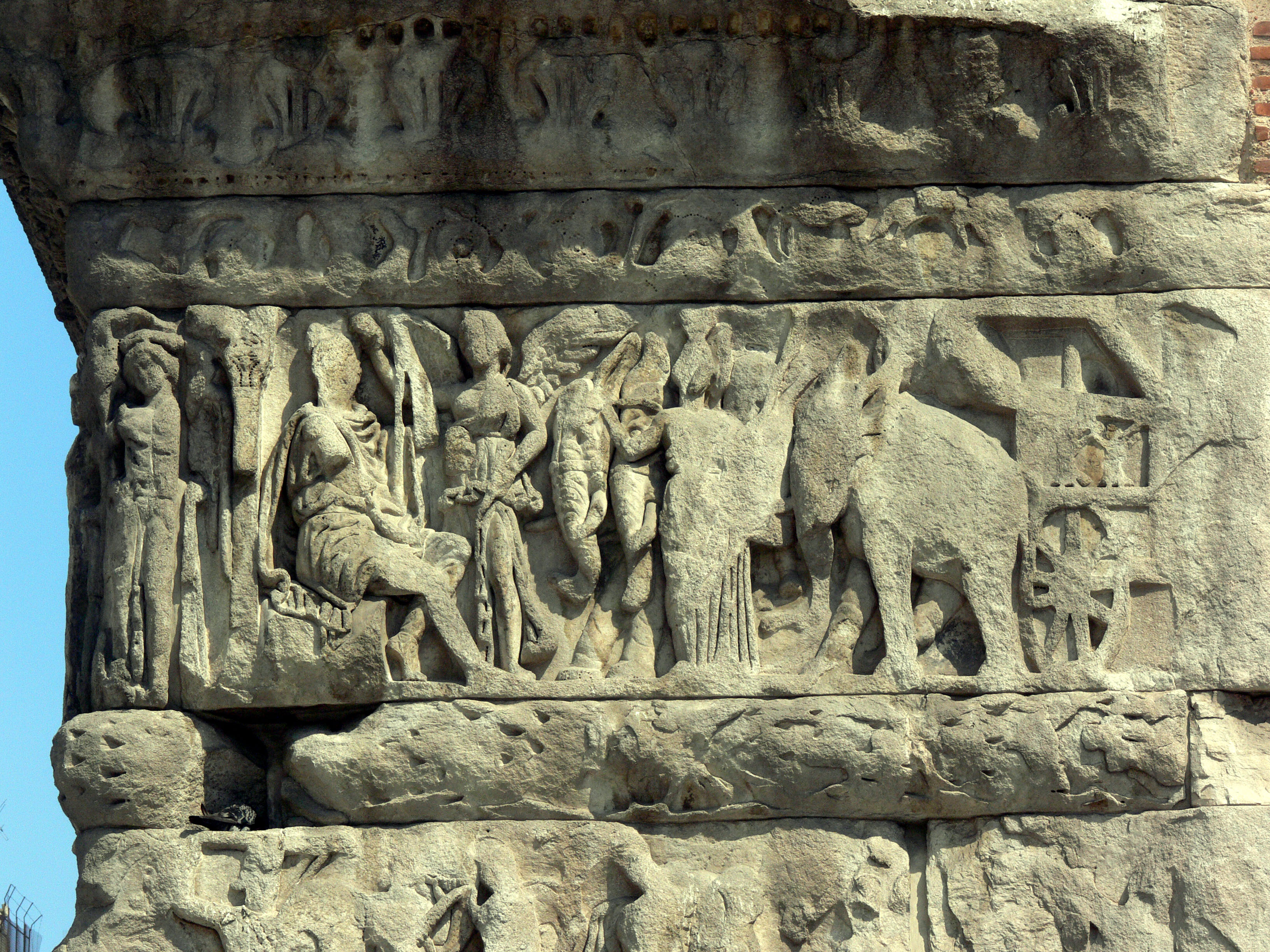 Tessaloniki. Galeriusbogen. Detail